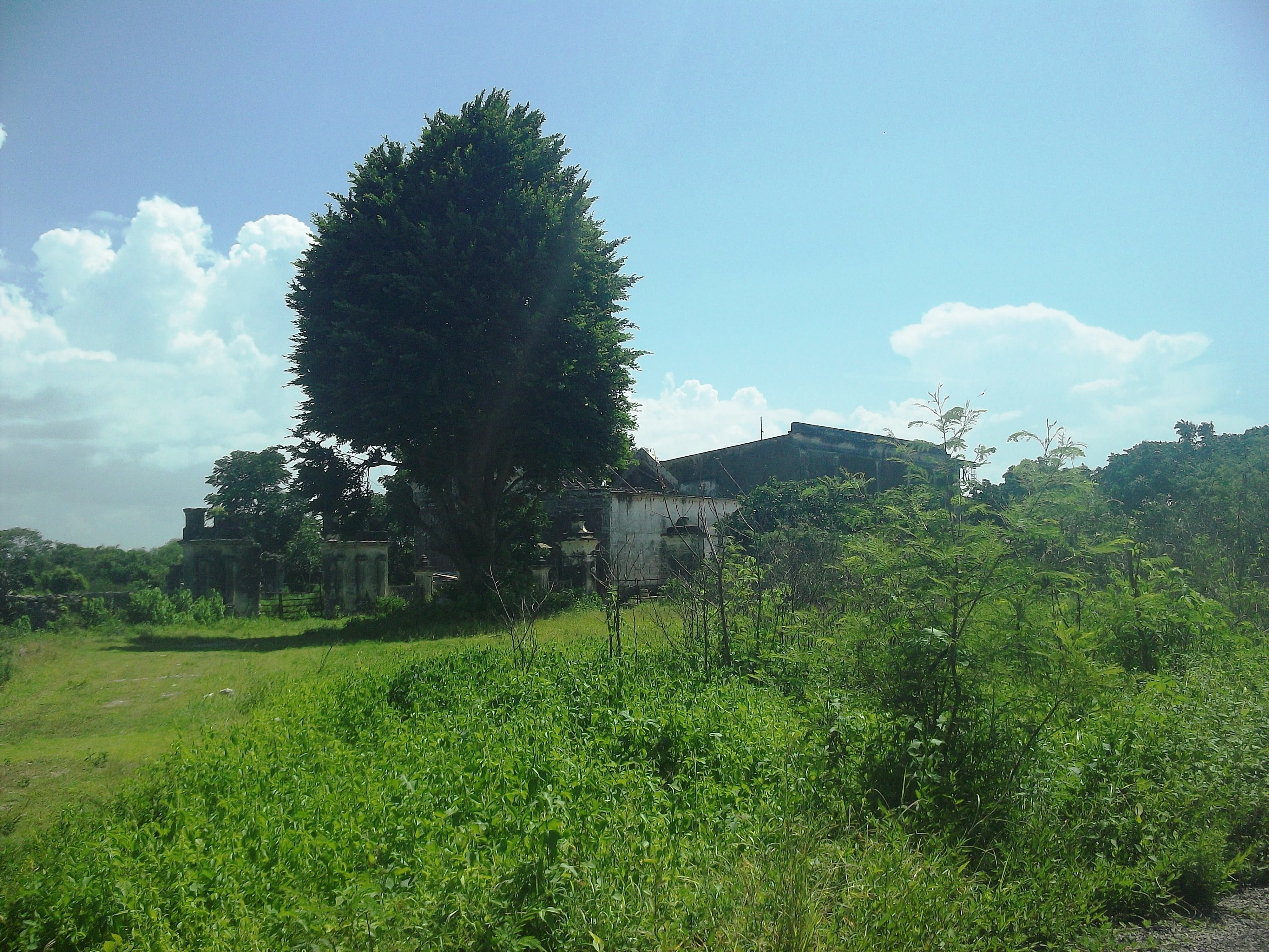 Vista de la hacienda de Ticopó Gutiérrez, Yucatán.